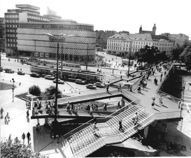 Leipzig, Fußgängerbrücke ADN-ZB Raphael 28.8.73-GU-Leipzig:Neue Fußgängebrücke im Leipziger Stadtzentrum-Vorbereitung Herbstmesse-Durch die neue Fußgängerzone über den Friedrich-Engels-Platz werden die in- und ausländischen Messebesucher sicherer das Ringmessehaus erreichen können.